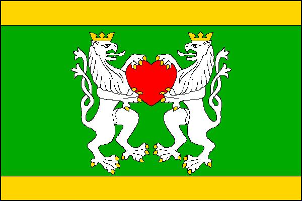 Vlajka obce Skalička v okrese Brno-venkov